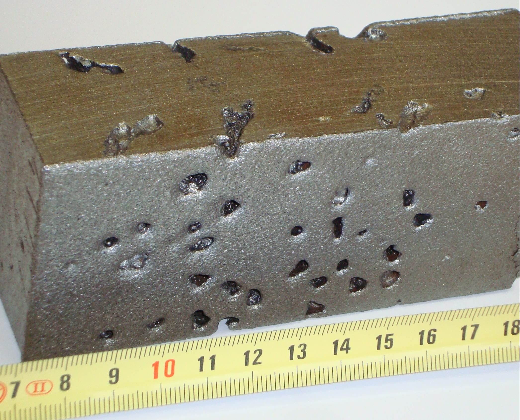 Gasporosität in GS-20Mn5